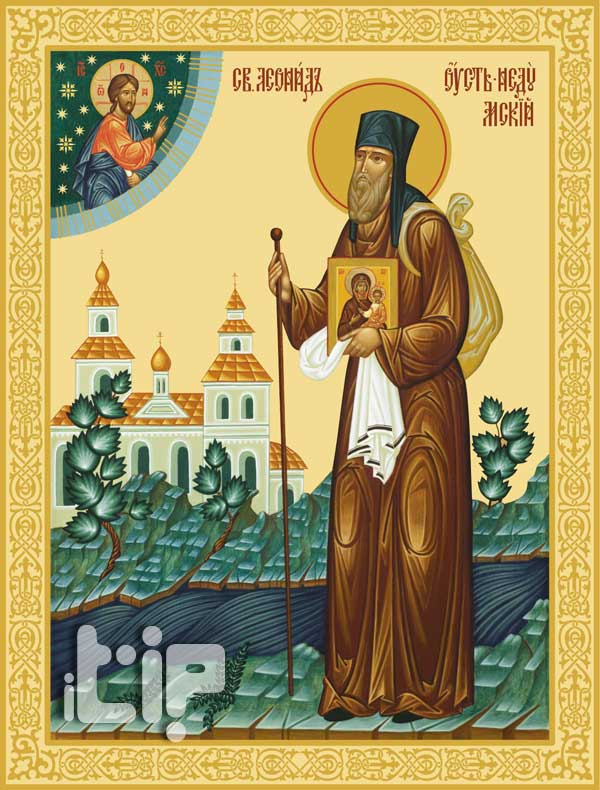 Икона Леонида Устьнедумского